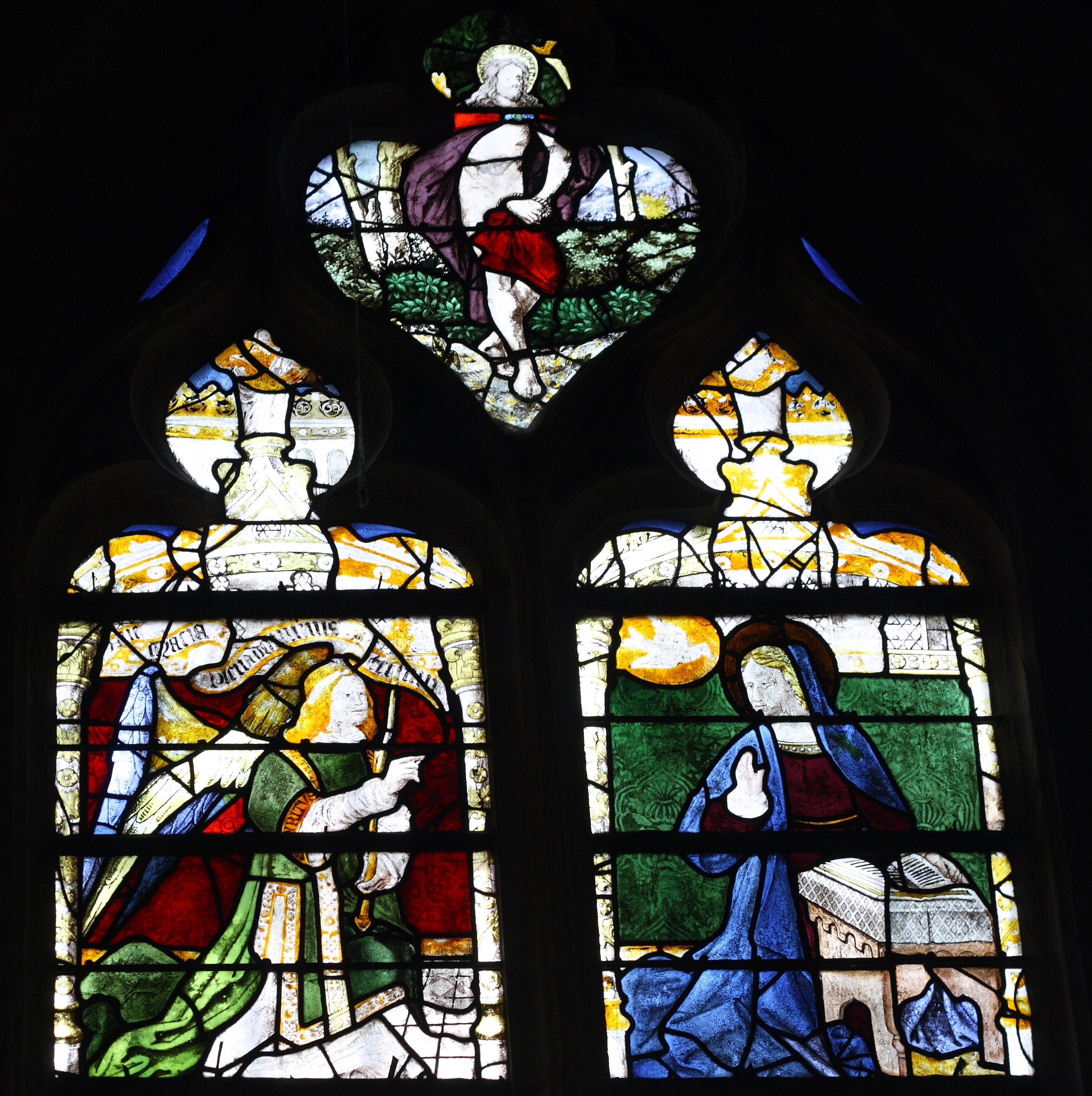 Katholische Pfarrkirche Saint-Martin in Herblay, einer Gemeinde im Département Val d'Oise (Île de France), Bleiglasfenster aus dem 16. Jh., Darstellung: Stifterfiguren (unten links), Mariä Tempelgang (unten rechts), Ausschnitt: Verkündigung (oben)